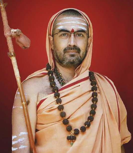 ಕನ್ನಡ: ಶ್ರೀಮತ್ ಸದ್ಯೋಜಾತ ಶಂಕರಾಶ್ರಮ ಸ್ವಾಮೀಜಿ